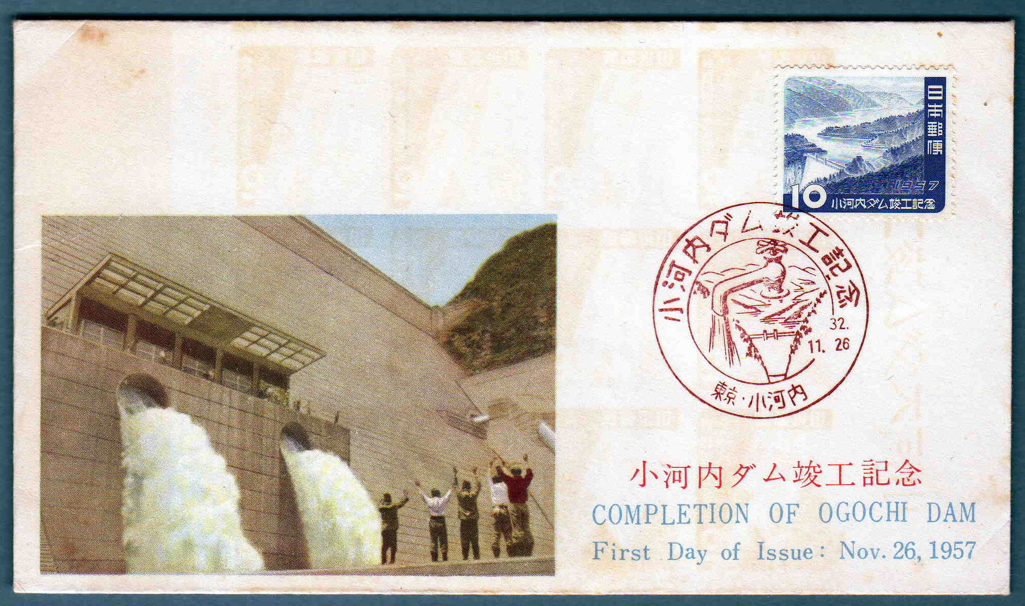 東京都にある小河内ダム竣工記念切手の初日カバー